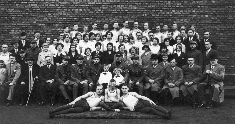 Towarzystwo Gimnastyczne "Sokół" w Katowicach. Fotografia grupowa członków Towarzystwa odziału Katowice-Załęże 1932.